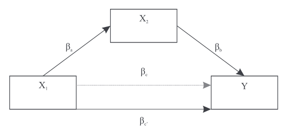 Supresja